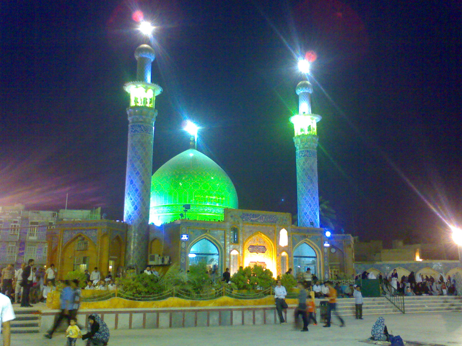 عکاس : میثم ابراهیمی